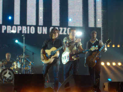 Luciano Ligabue Ellesette DatchForum Assago 17/12/2007